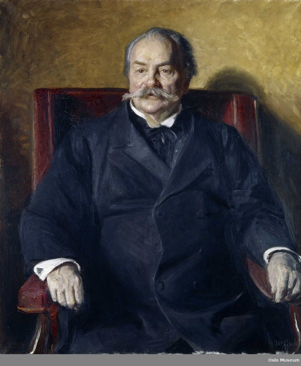 Portræt af den norske komponist og dirigent Johan Svendsen